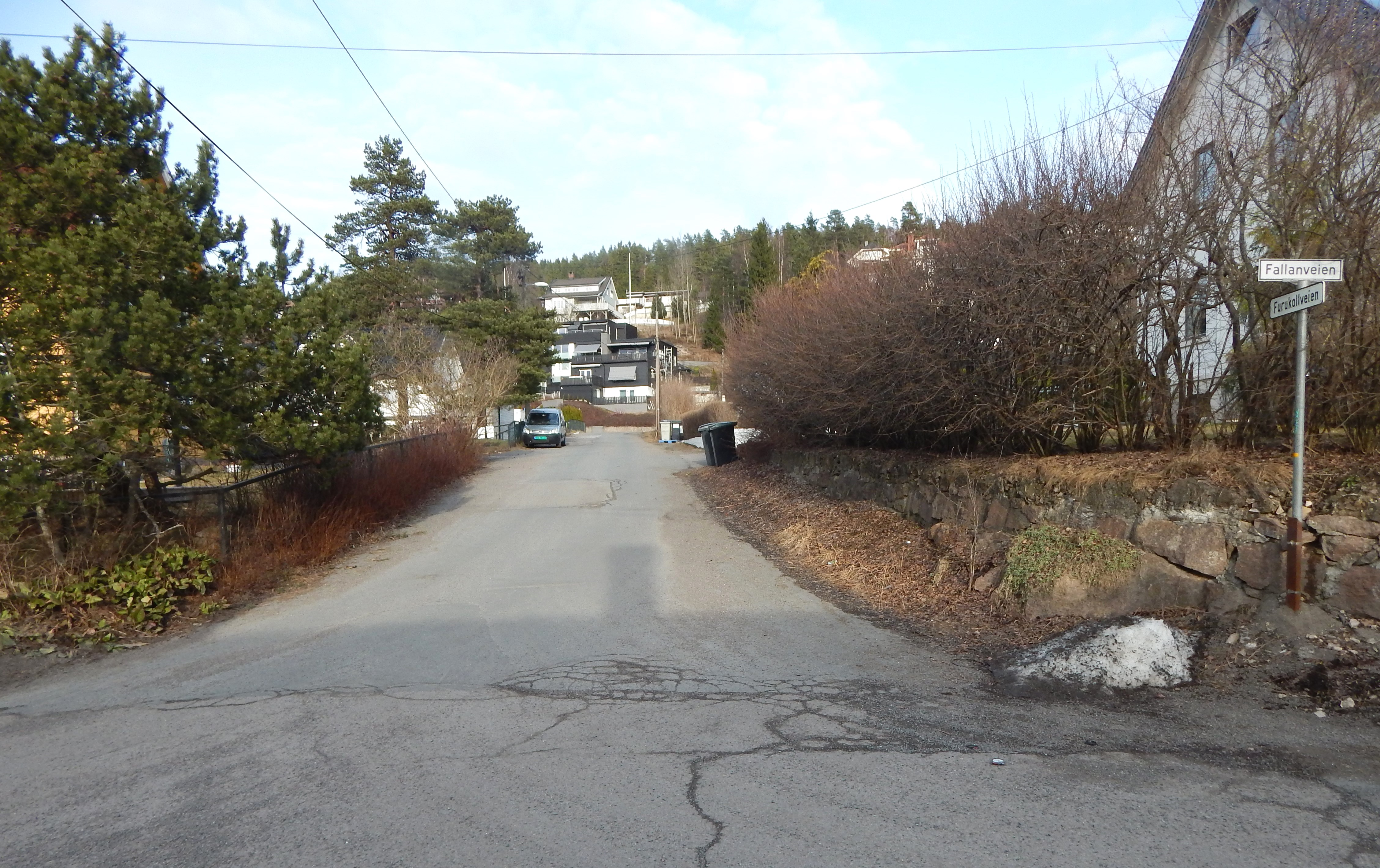 Furukollveien sett fra Fallanveien